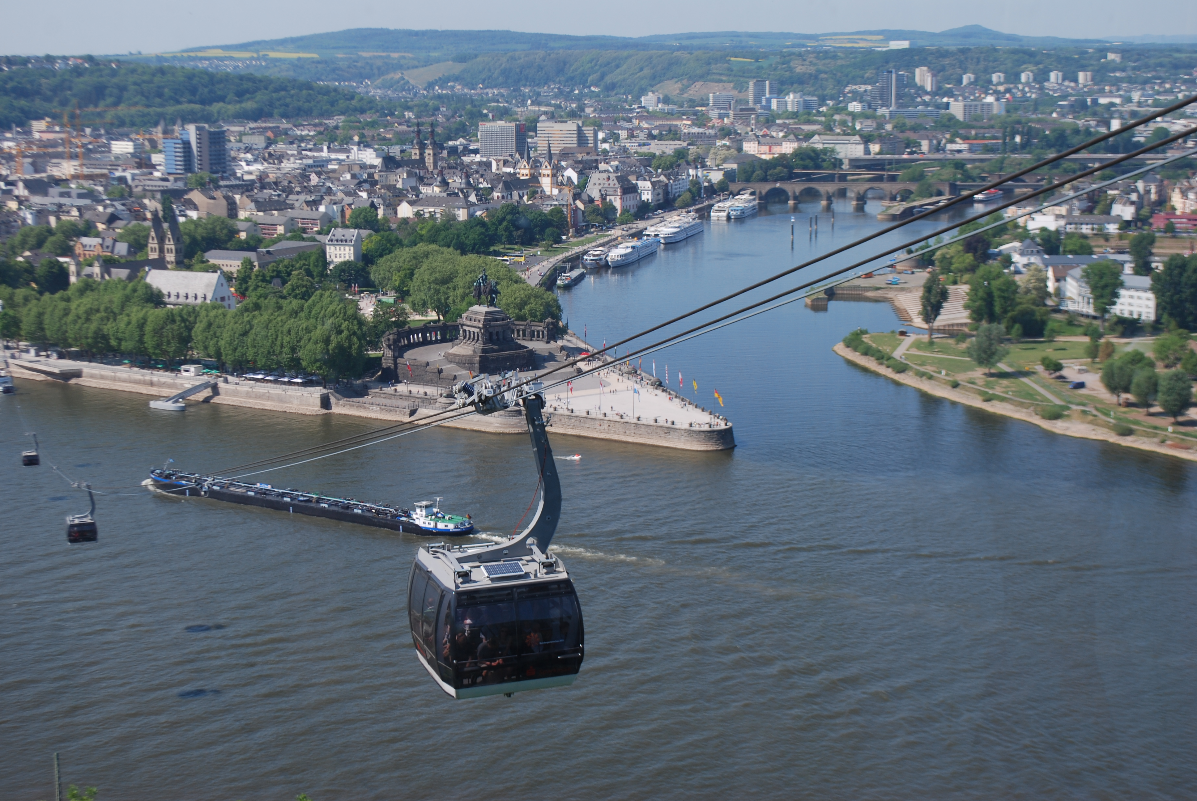 Le téléphérique du Rhin à Koblenz : trajet de la forteresse d'Ehrenbreitstein au Deutsche Eck.